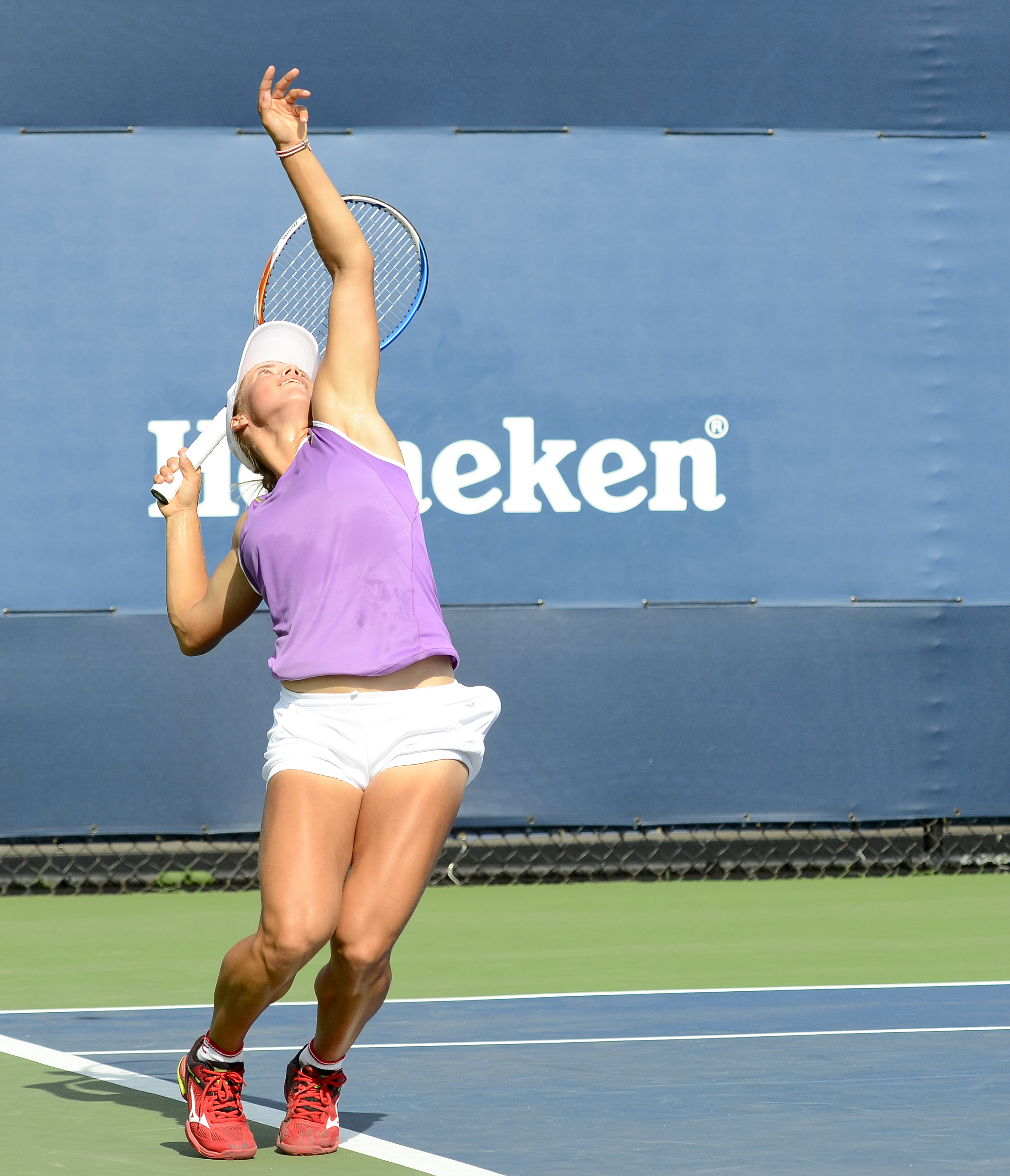 August 19, 2013 Queens, NY Yulia Putintseva (KAZ) def. Montserrat Gonzalez (PAR)